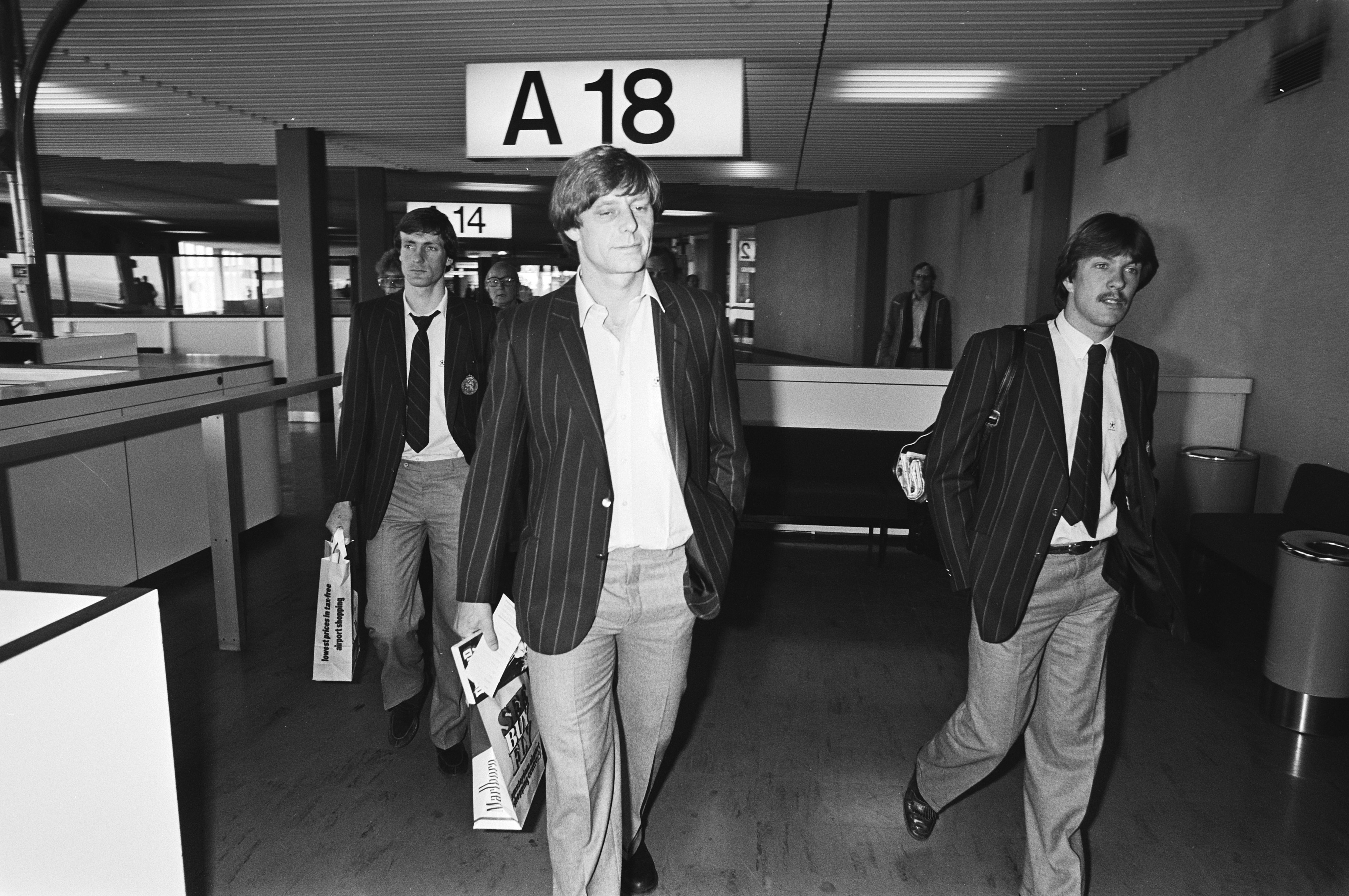 Collectie / Archief : Fotocollectie Anefo Reportage / Serie : [ onbekend ] Beschrijving : Vertrek Nederlands elftal naar Nicosia (Cyprus) voor de wedstrijd tegen Cyprus, Cees van Kooten (Eagles) bij vertrek van Schiphol Datum : 27 april 1981 Locatie : Noord-Holland, Schiphol Trefwoorden : VERTREKKEN, elftallen, vliegvelden Persoonsnaam : EAGLES Fotograaf : Croes, Rob C. / Anefo Auteursrechthebbende : Nationaal Archief Materiaalsoort : Negatief (zwart/wit) Nummer archiefinventaris : bekijk toegang 2.24.01.05 Bestanddeelnummer : 931-4535